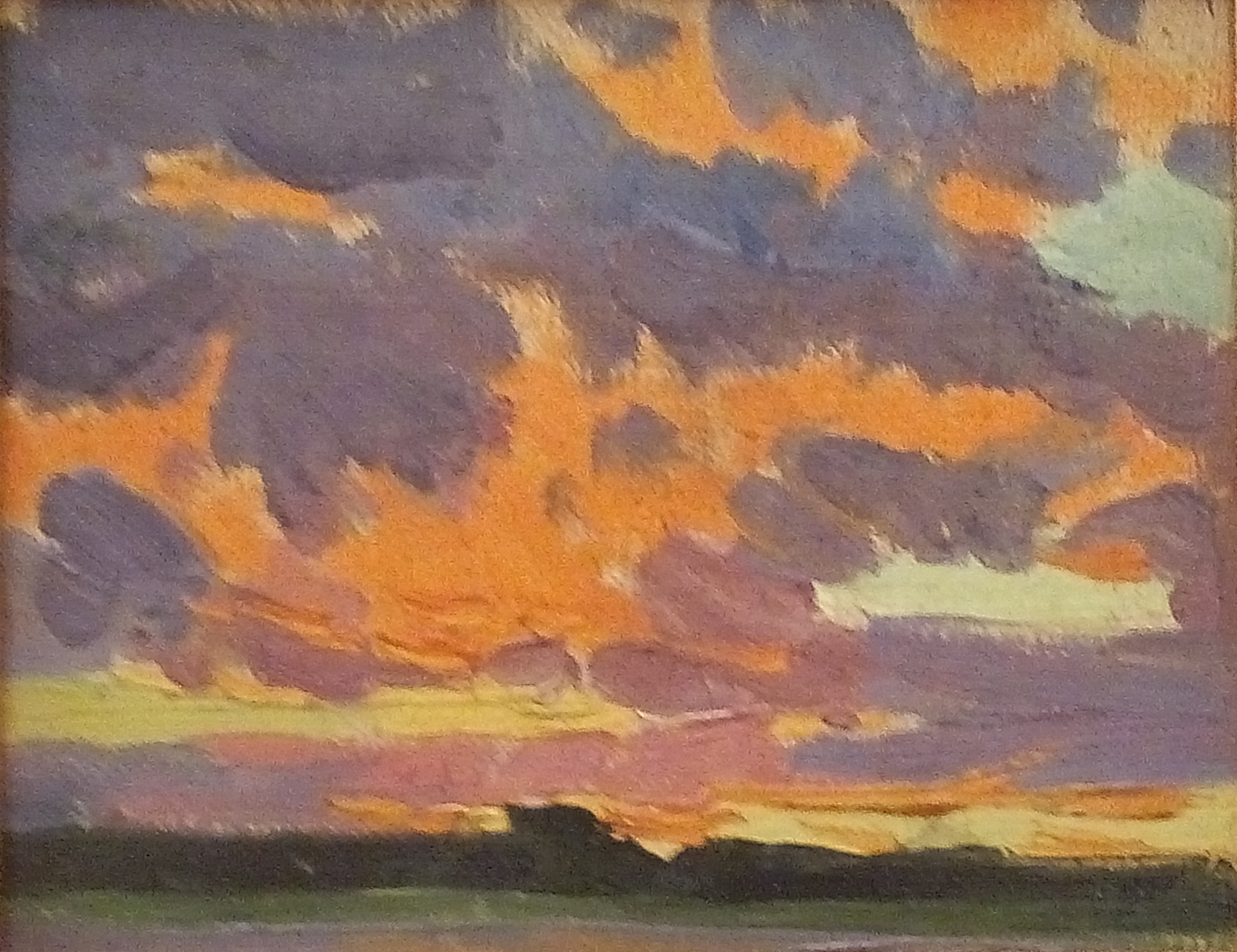 Аркадий Рылов (1870—1939). Ленин в Разливе. Этюд. Русский музей